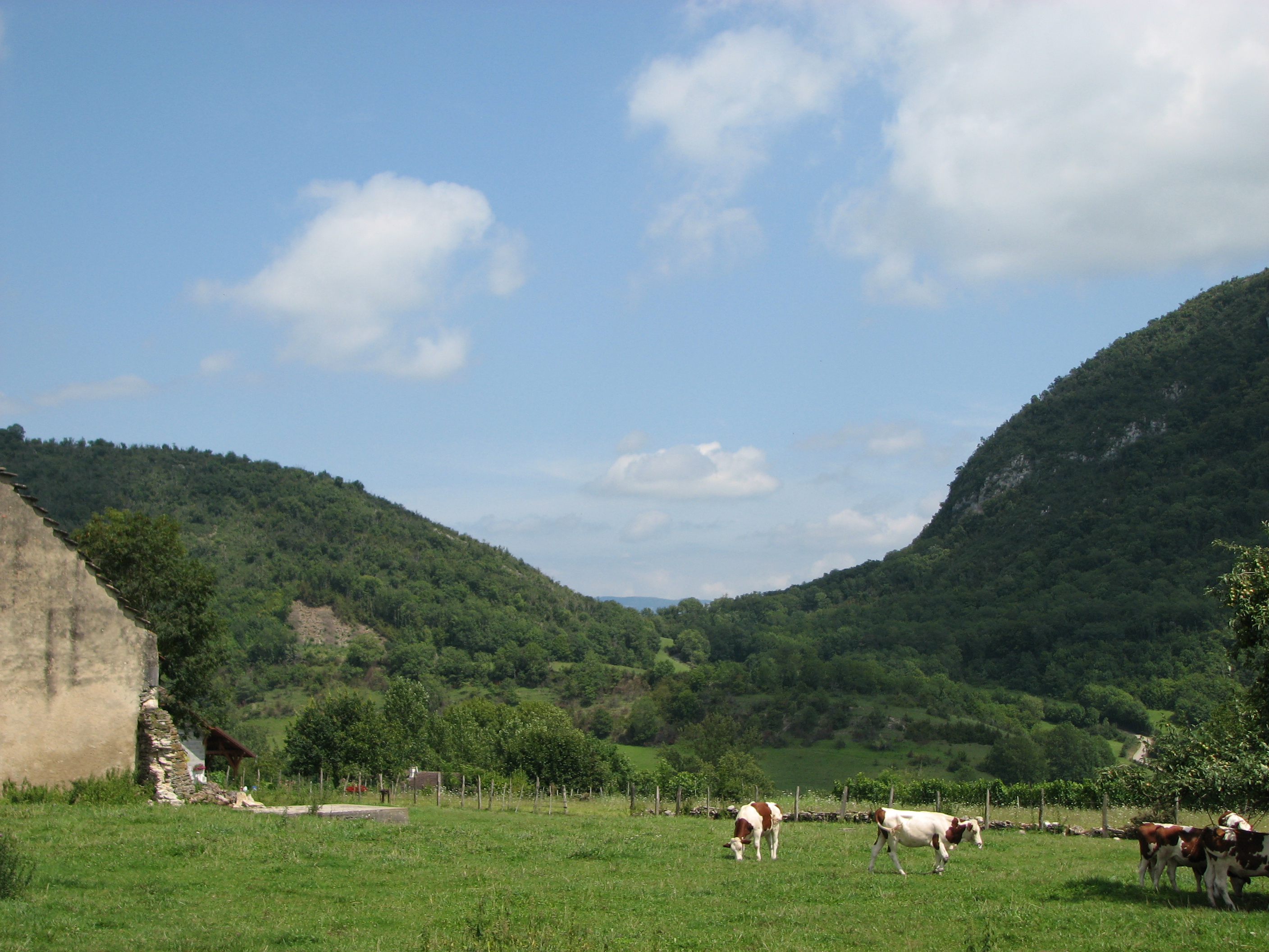 Col de Prémeyzel, entre Prémeyzel et Peyrieu (Ain).